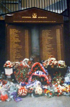 Summary Photo perso du Liverpool Memorial érigé à la mémoire des 95 victimes de la tragédie de Hillsborough devant le Stade d'Anfield (Liverpool FC). Licensing